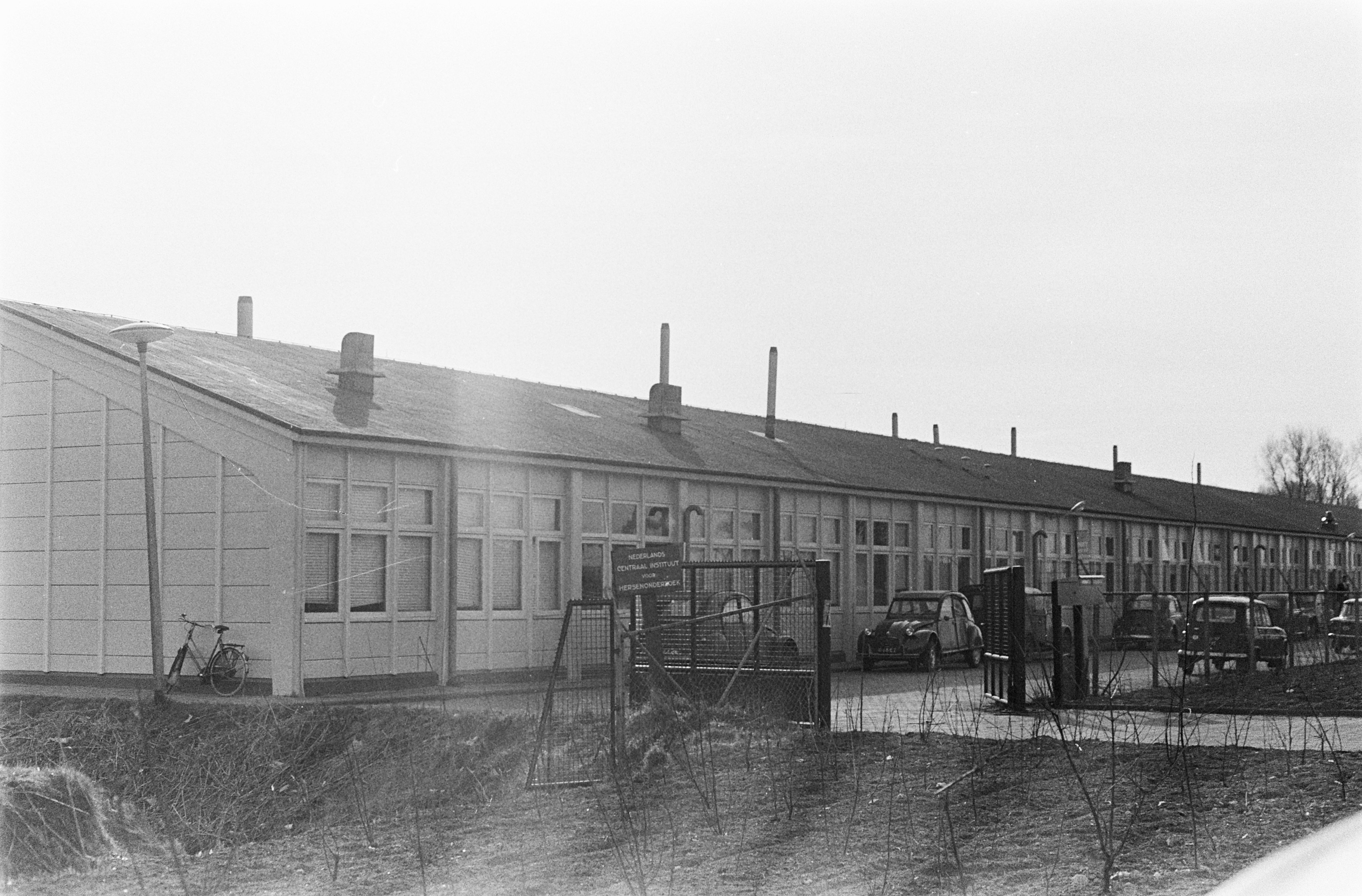 Exterieur Nederlands Centraal Instituut voor hersenonderzoek (waar dr. J.P. Schade , waarnemend directeur is) Datum 10 maart 1969